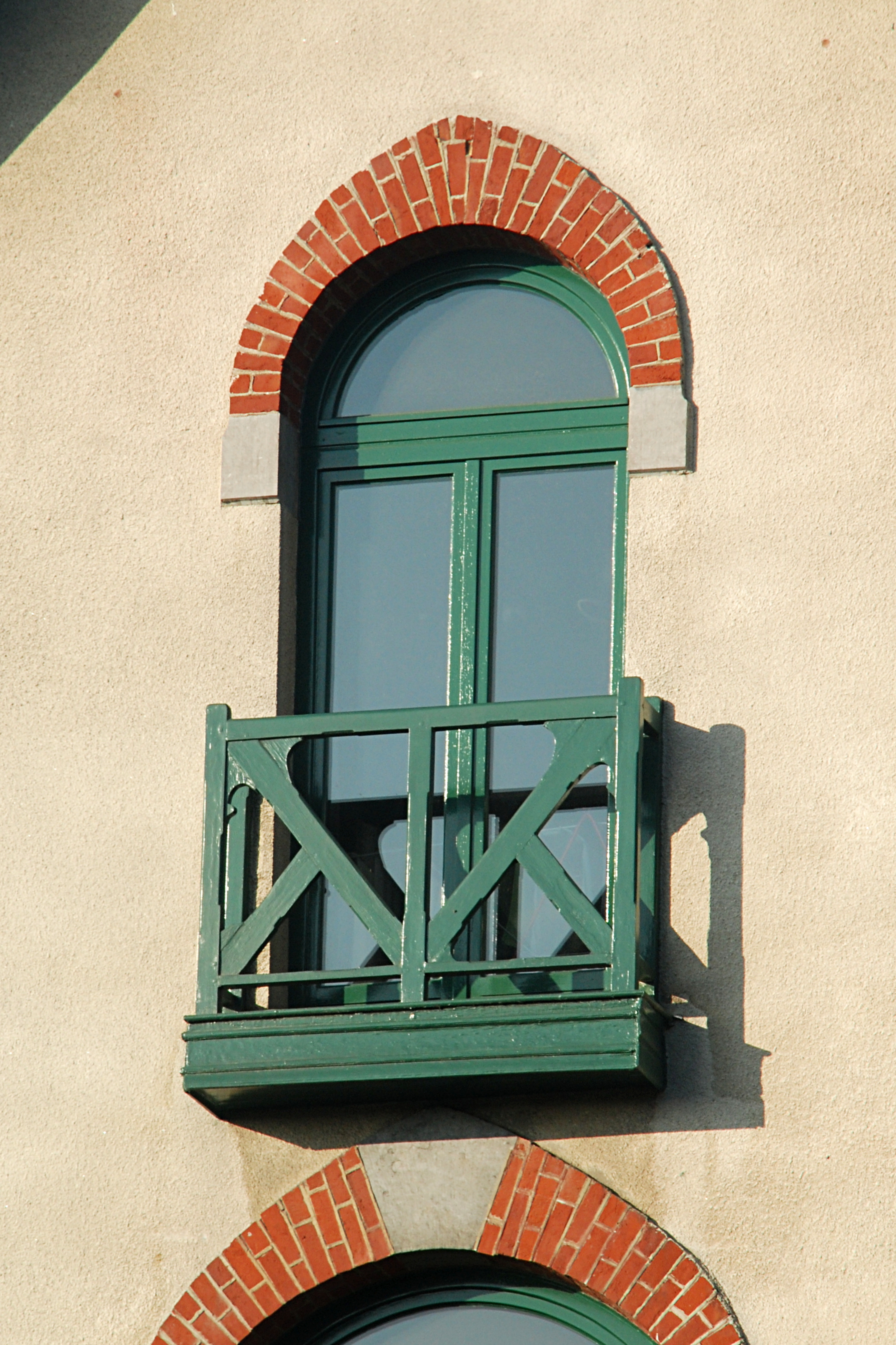 Belgique - Bruxelles - Watermael - William Jelley - Villa Art nouveau - Avenue des Taillis 9